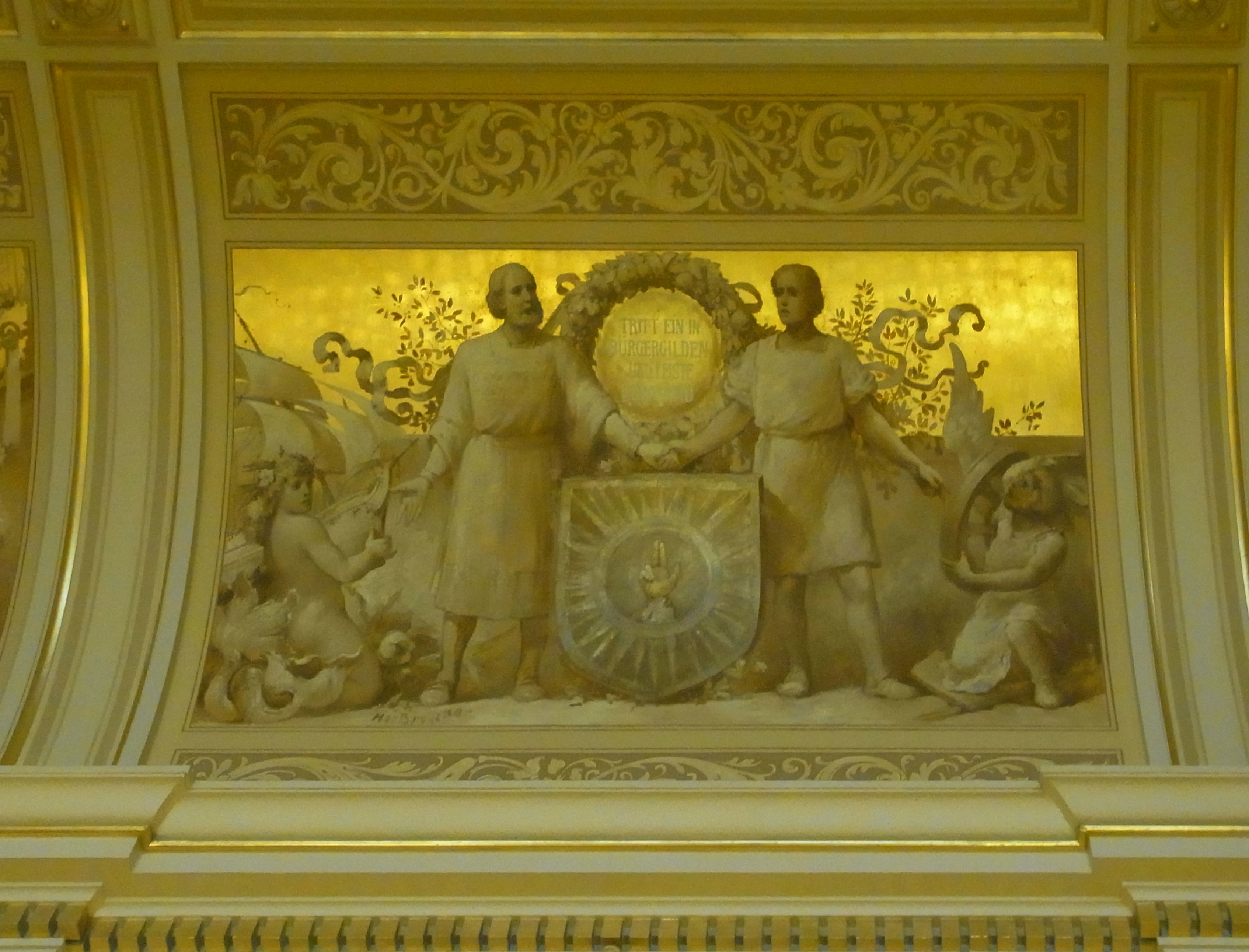 Das zentrale Gemälde "Der Bürgereid" im Bürgerschaftstreppenhaus von Hermann de Bruckers